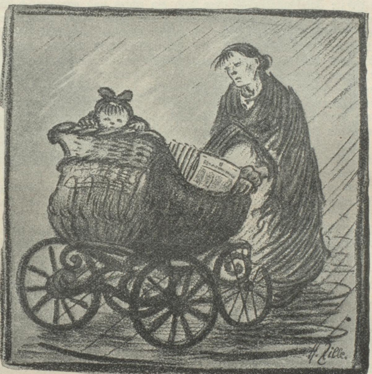 Heinrich Zille Clara Viebig Das tägliche Brot 1900